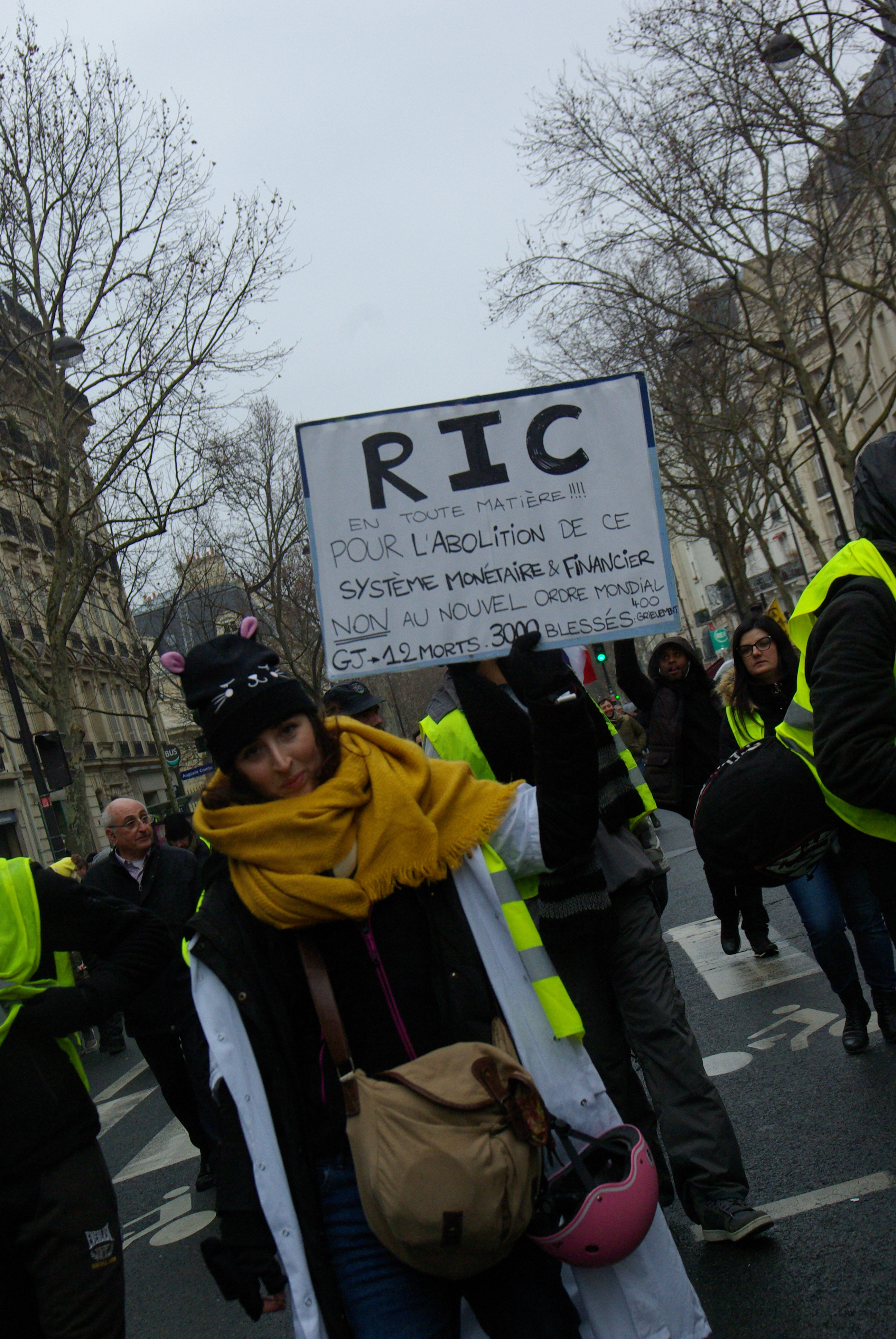 Paris, Bd st Michel, street doctor avec gilet jaune et pancarte RIC et bilan humain du mvt des GJ